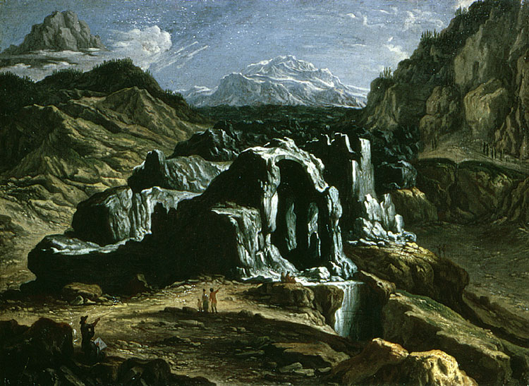 Titel: Unterer «Grindelwaldgletscher» von Felix Meyer (1653–1713), Öl auf Leinwand, 56x76 cm, ausgestellt im Kunstmuseum Winterthur, im Besitz der Stadt Winterthur